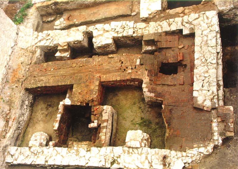 Renesanční sladovna